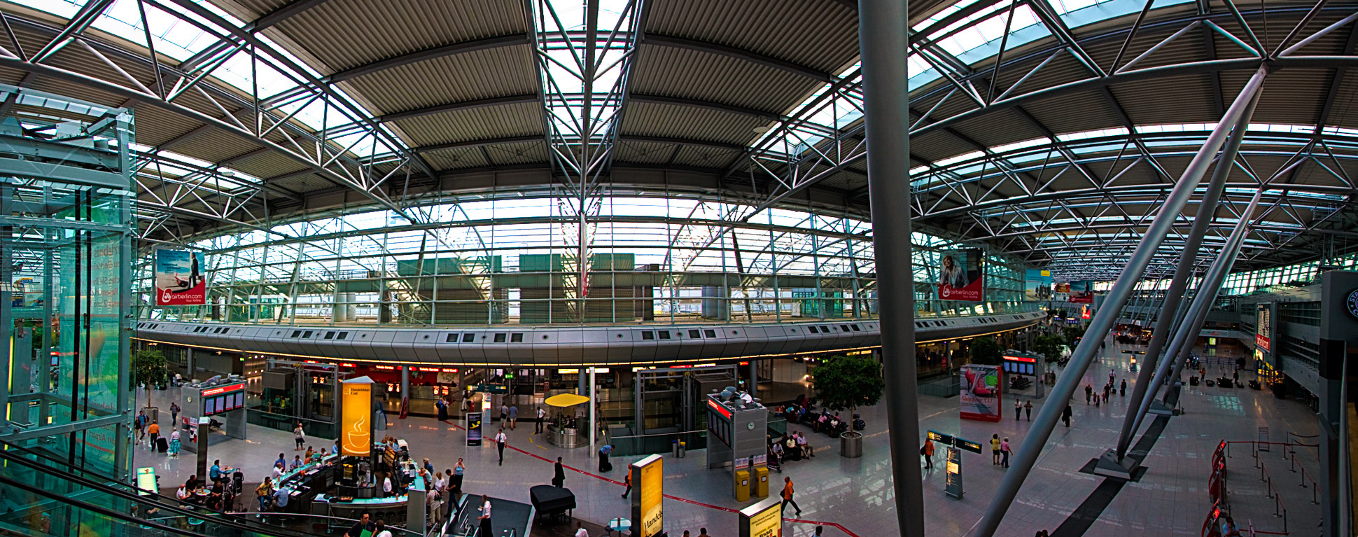 Terminalgebäude Flughafen Düsseldorf International.